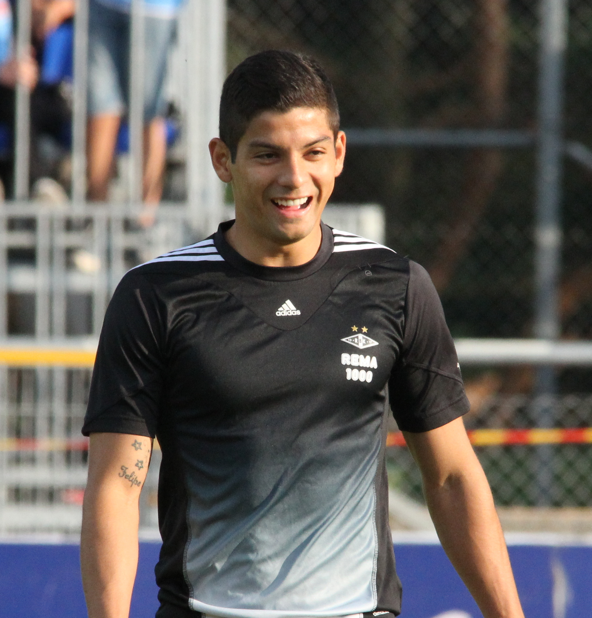 Christian Gamboa på Sandnes stadion 25. august 2013